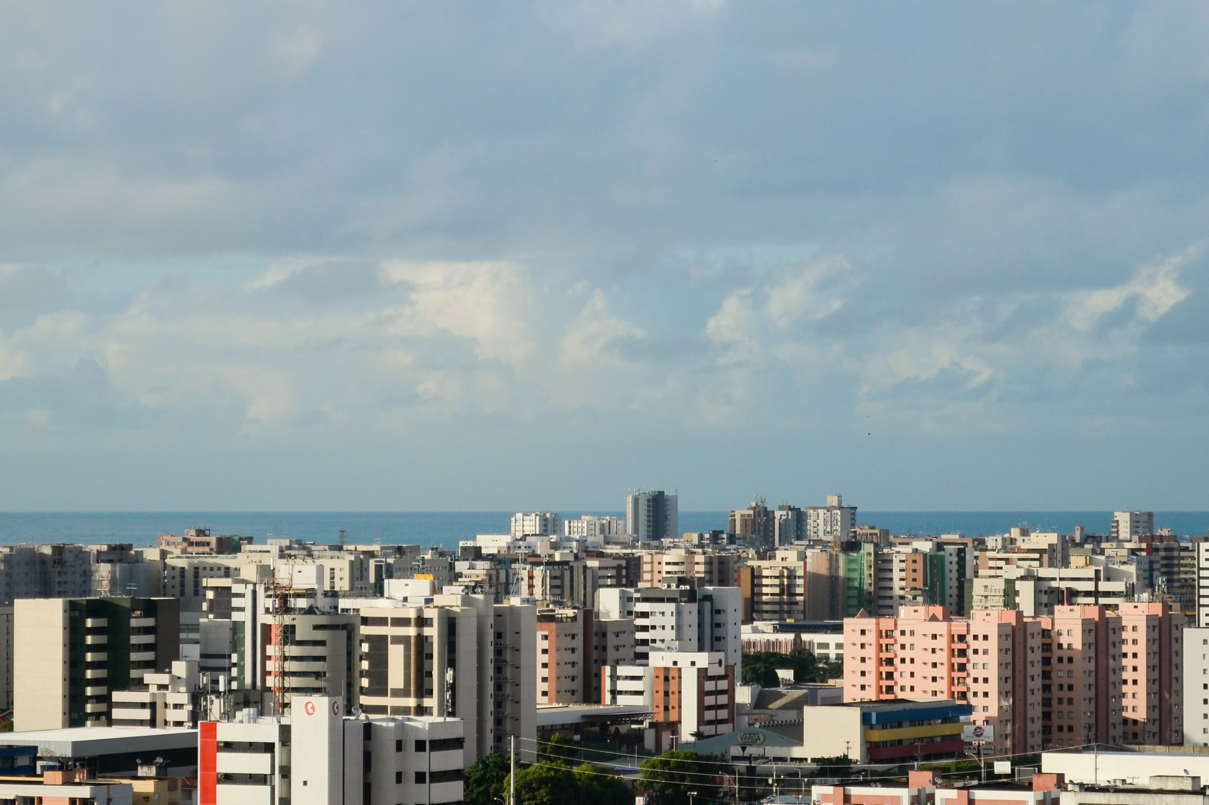 Vista dos bairros de Jatiúca e Ponta Verde.